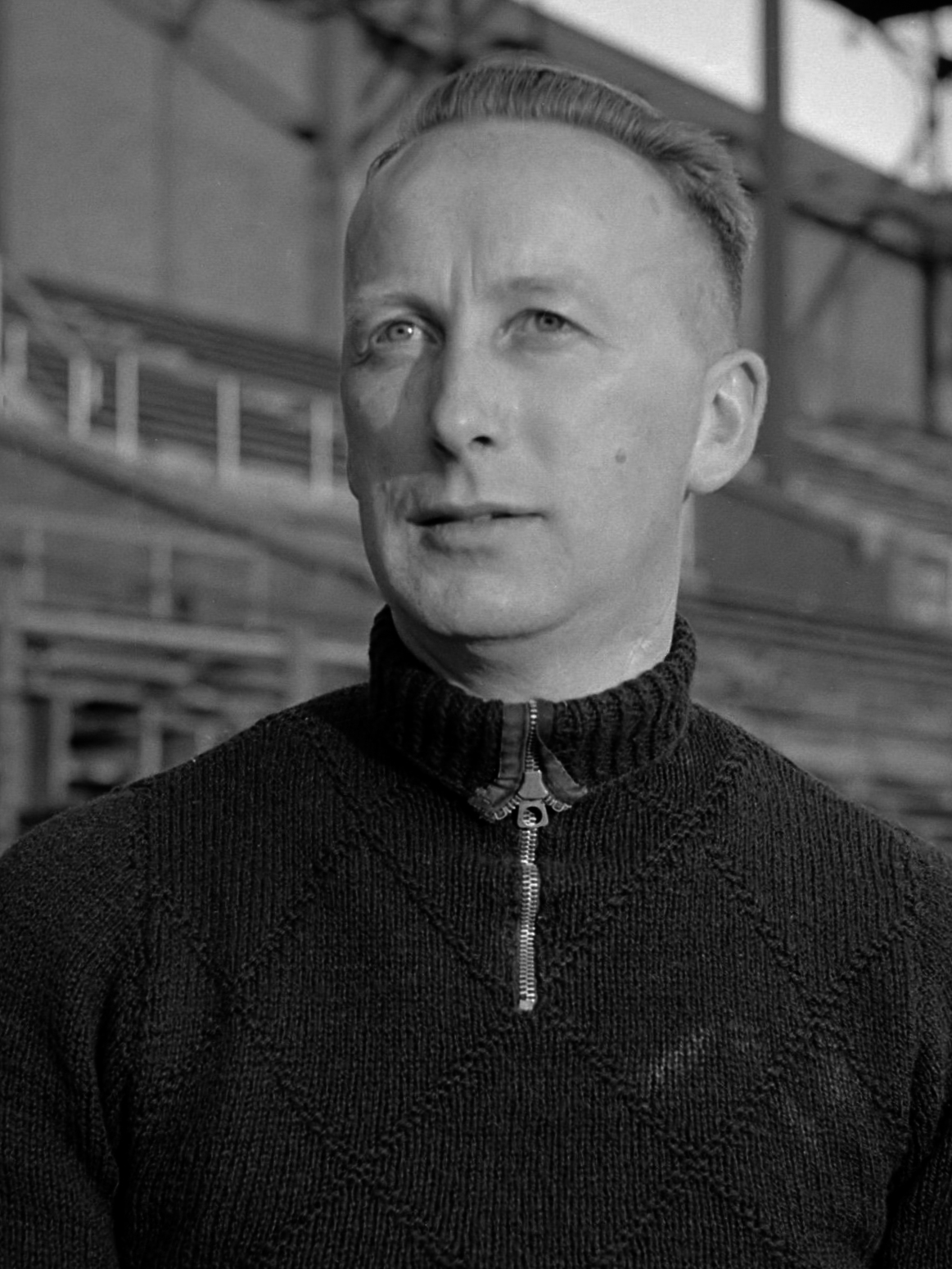 Nederlands voetbalelftal 1951. Jaap van der Leck (bondscoach van het Nederlands elftal 1949-1954) in het Olympisch Stadion, enige dagen na de oefeninterland tegen België 24 april 1951